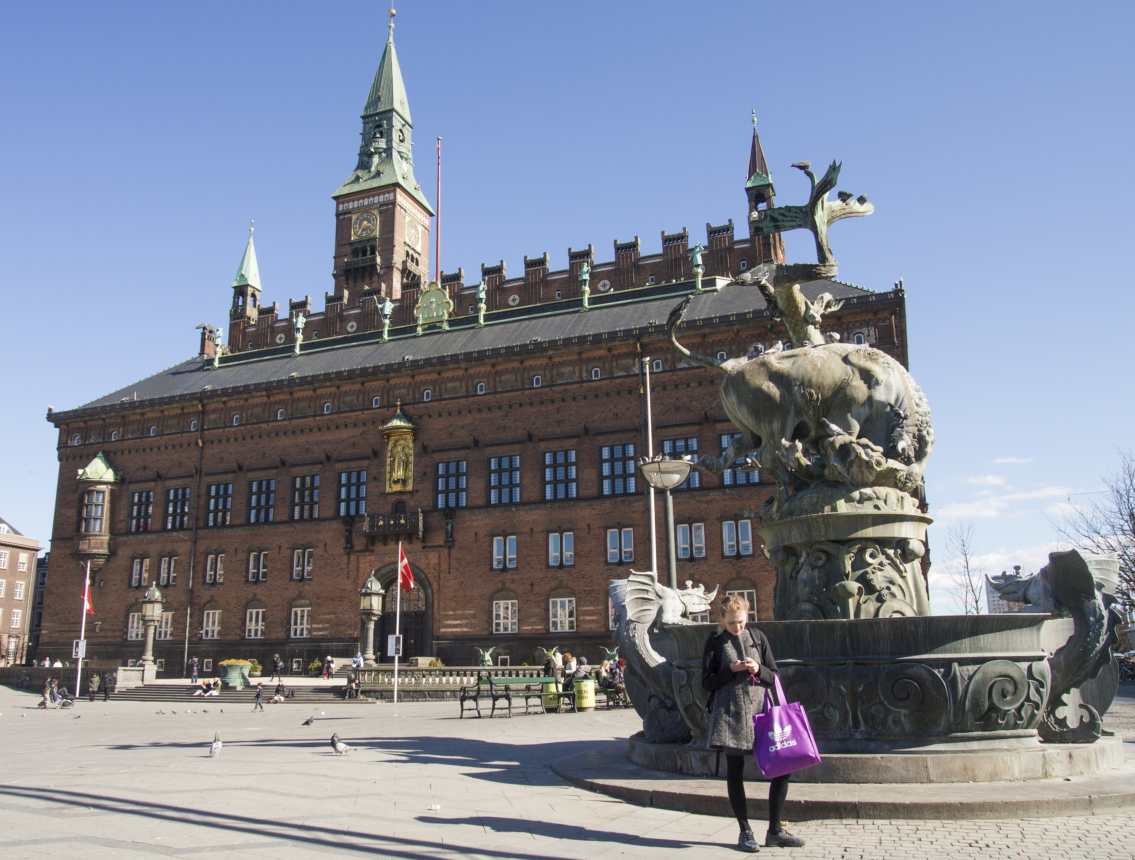 Københavns Rådhus fotograferat den 3 april 2013, Köpenhamns Rådhus, Copenhagen townhall. Foto: News Øresund – Johan Wessman. © News Øresund. Bilden får fritt publiceras under förutsättning att källa anges. The picture can be used freely under the prerequisite that the source is given. Originalfil tillhandahålles gratis, kontakta: News Øresund, Malmö, Sweden. News Øresund är en oberoende regional nyhetsbyrå som ingår i projektet Øresund Media Platform som drivs av Øresundsinstituttet i partnerskap med Lunds universitet och Roskilde Universitet och med delfinansiering från EU (Interreg IV A Öresund) och 14 regionala, icke kommersiella aktörer.